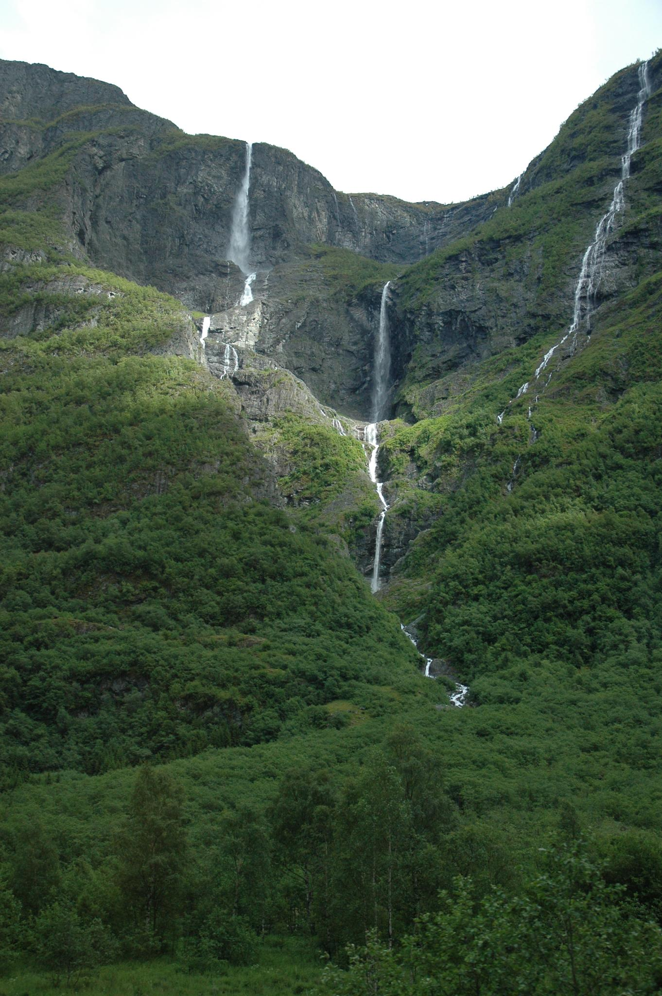 Kjelfossen